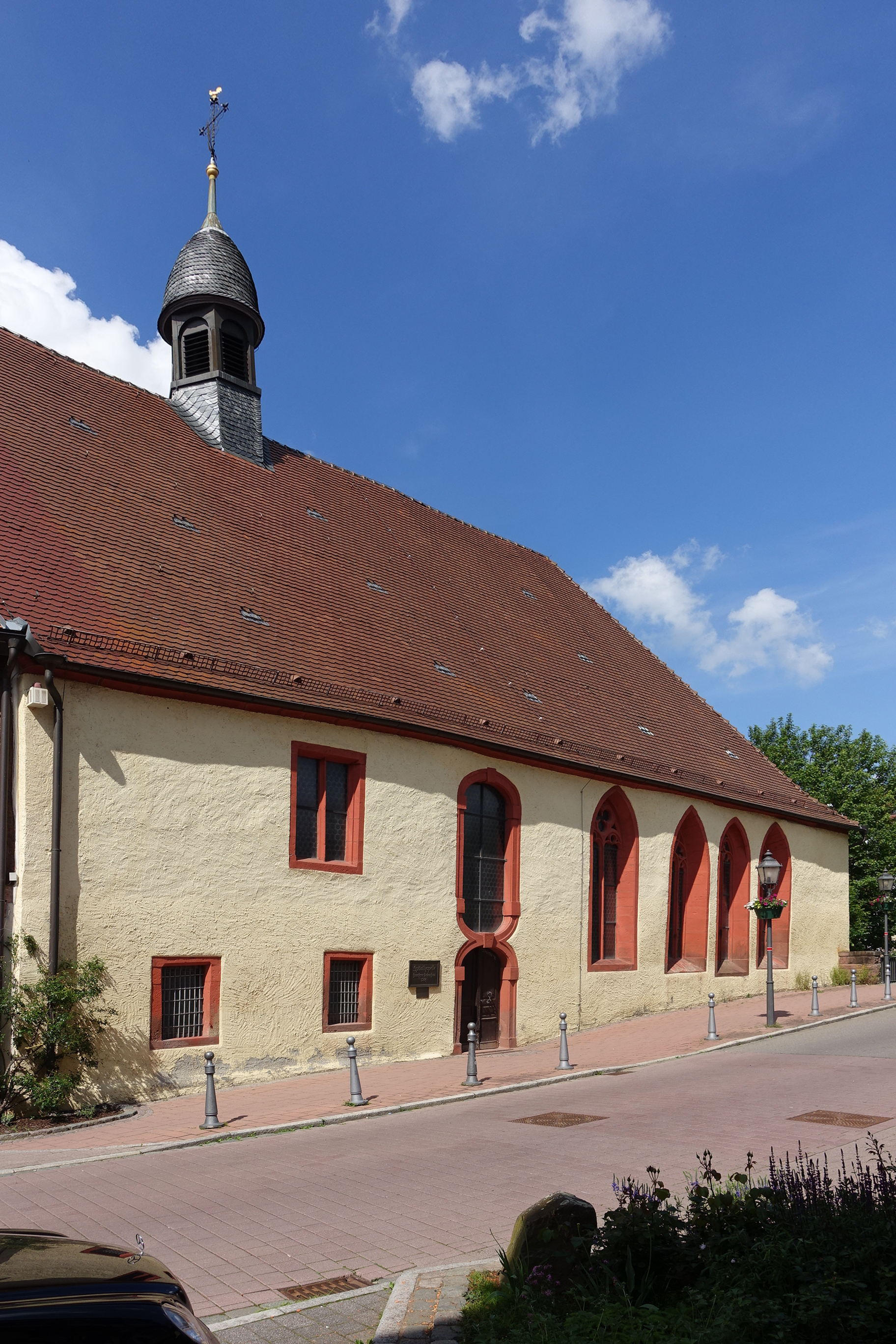 Spitalkapelle